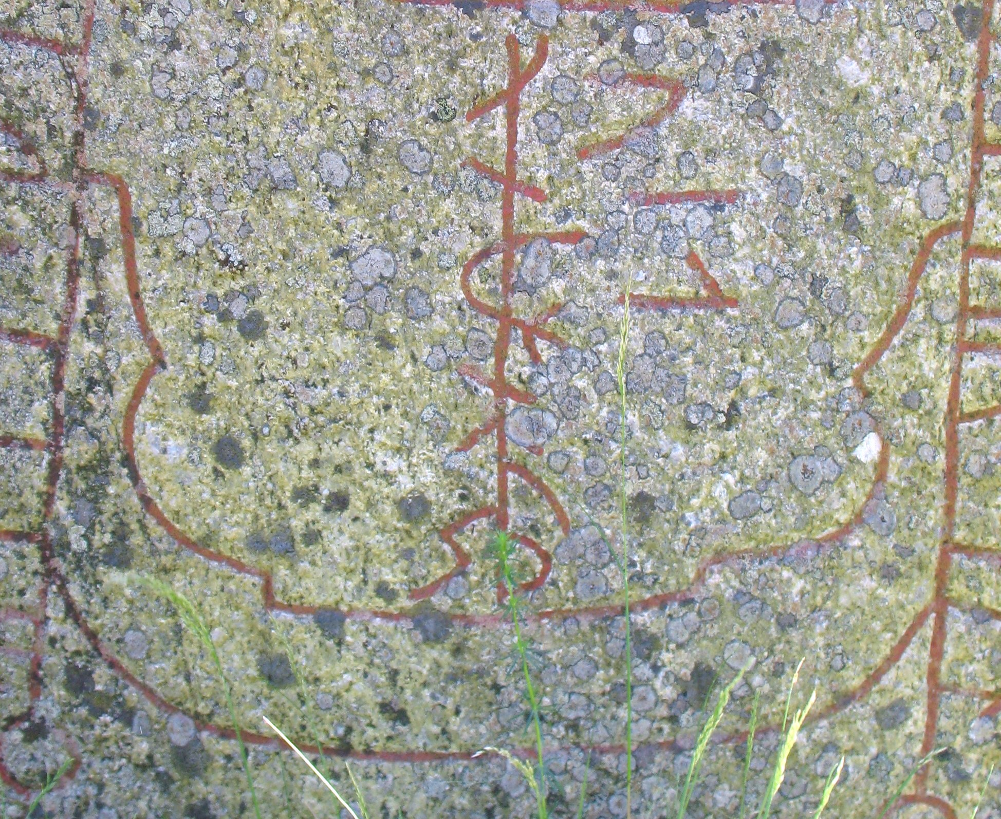 Samstavsrunbåt, Sö 158 - Österberga, Runtuna sn, Rönö hd, Södermanland